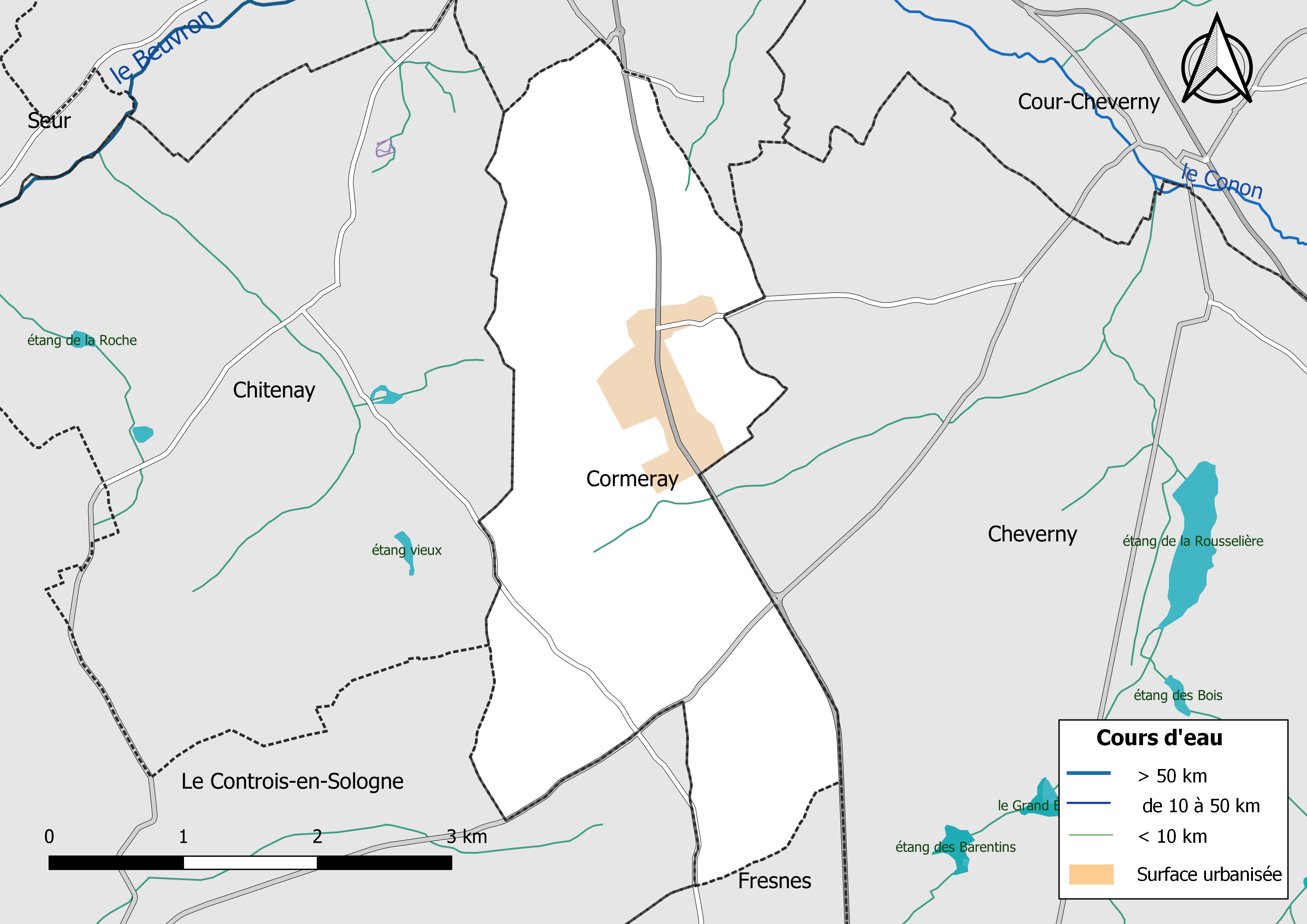 Carte du réseau hydrographique de la commune de Cormeray (Loir-et-Cher, France).